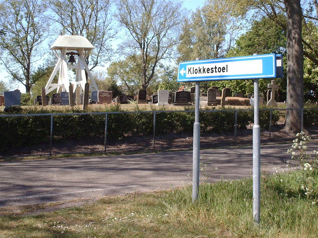 Klokkenstoel en bord Mirns